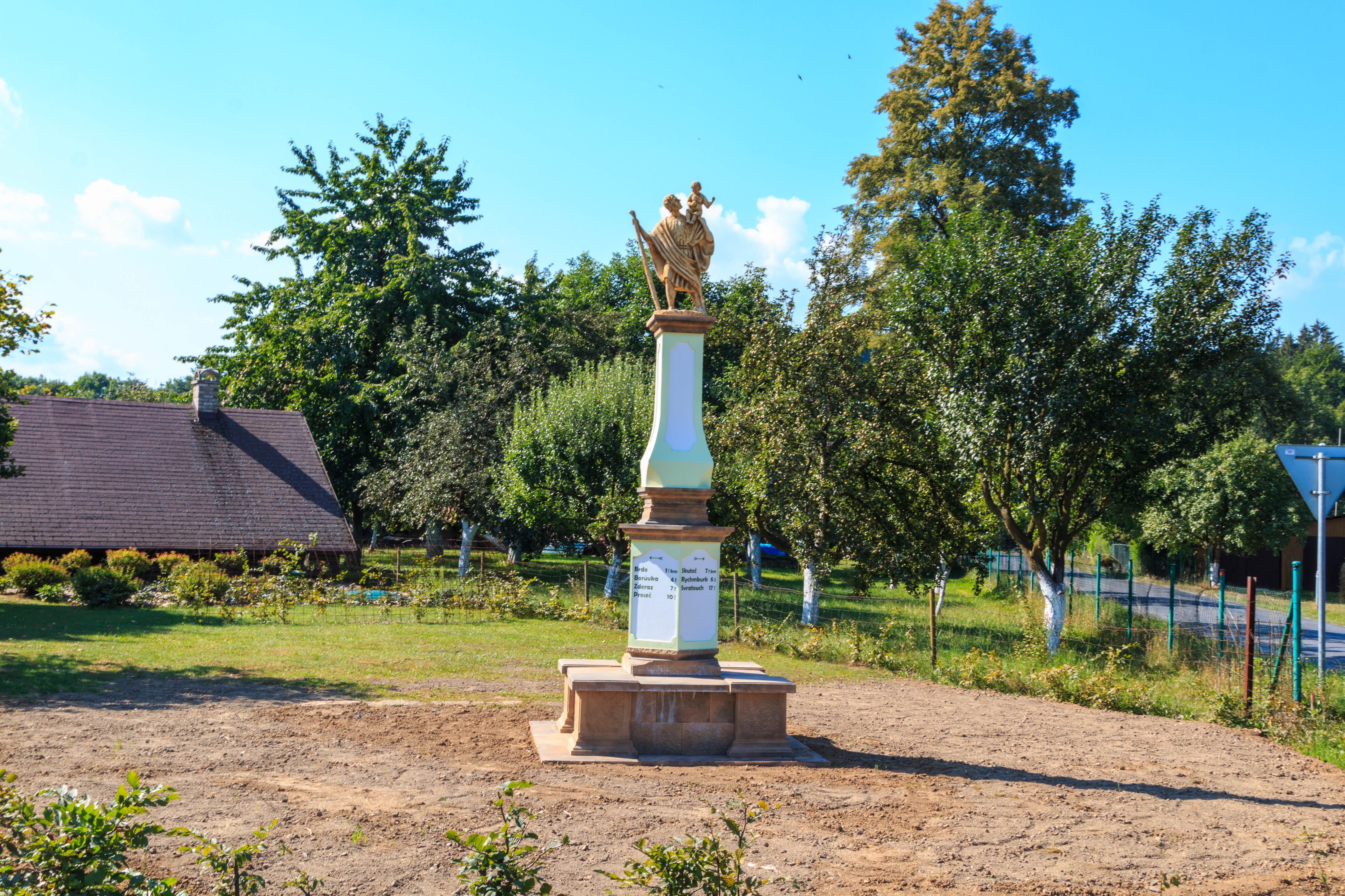 Doly u Luže - svatý Josef